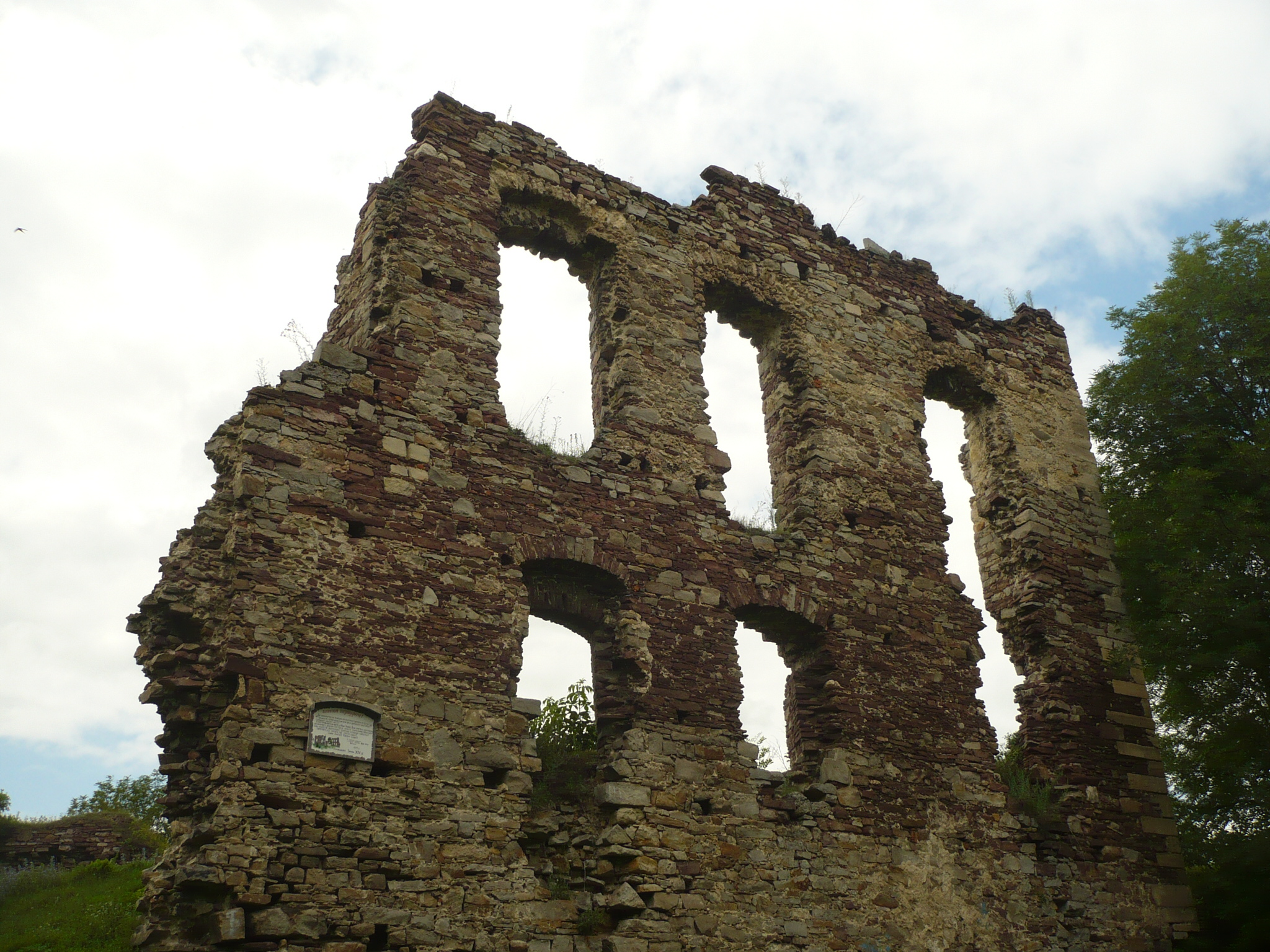 Buczacz. Zamek